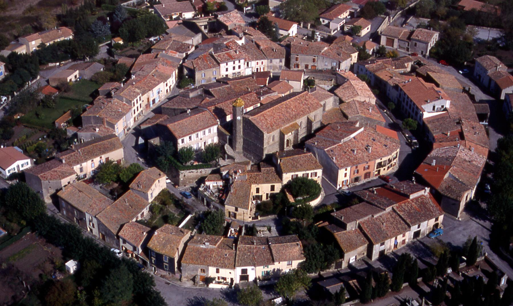 Vue aérienne d'Alairac(11290)